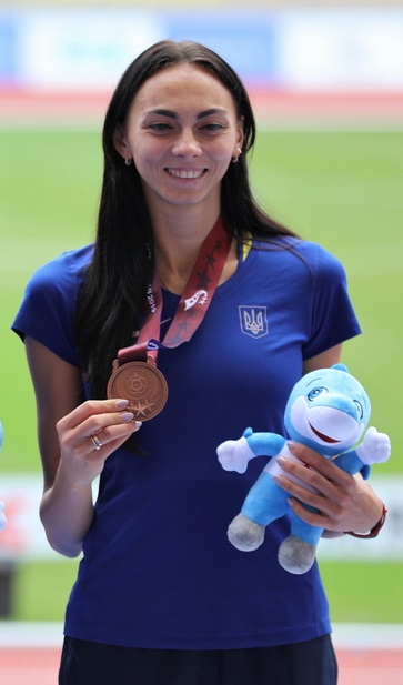 Ирина Геращенко на VII Всемирных военных играх.